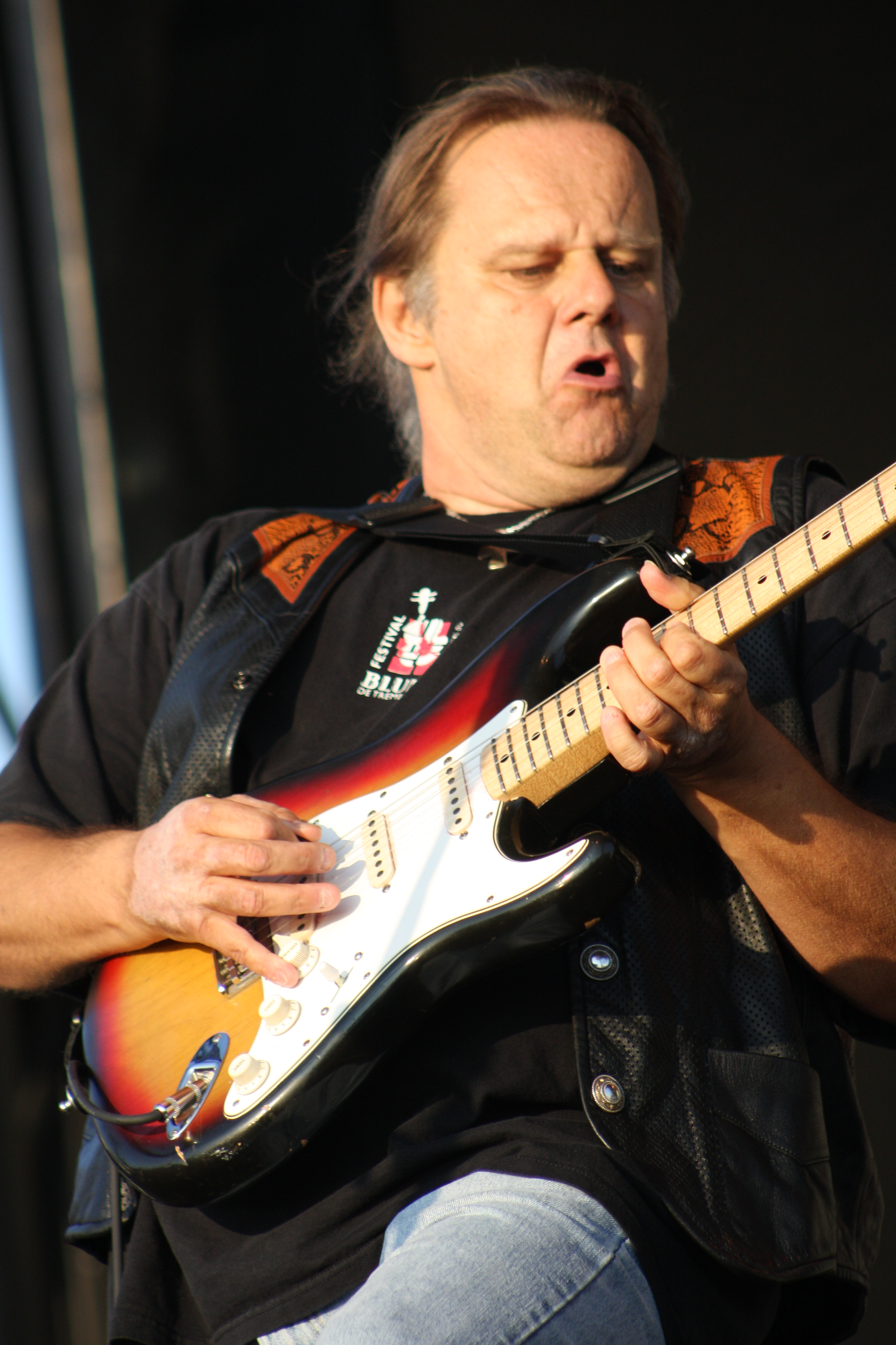 Уолтер Траут на Ottawa Bluesfest в 2008 году